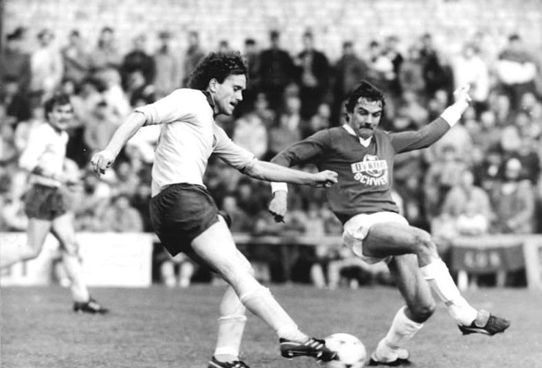 ADN-ZB-Pätzold -31.10.87-zei-Schwerin: FDGB-Pokal- 2. Runde- Vor 8 300 Zuschauern setzte sich in der mecklenburgischen Bezirksstadt der 1. FC Lok Leipzig gegen Gastgeber Dynamo Schwerin durch. Nach erfolgreichem Zweikampf gegen Gerbert Eggert (r.) konnte Olaf Marschall das erste Tor für die Messestäder eringen. Beim Endstand von 2:0 für Lok Leipzig war Marschall zweifacher Torschütze.